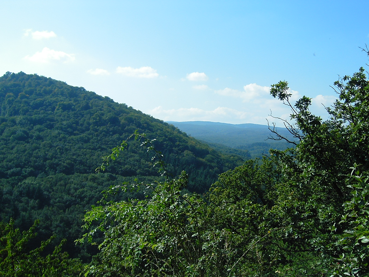 Malé Karpaty, Slovakia